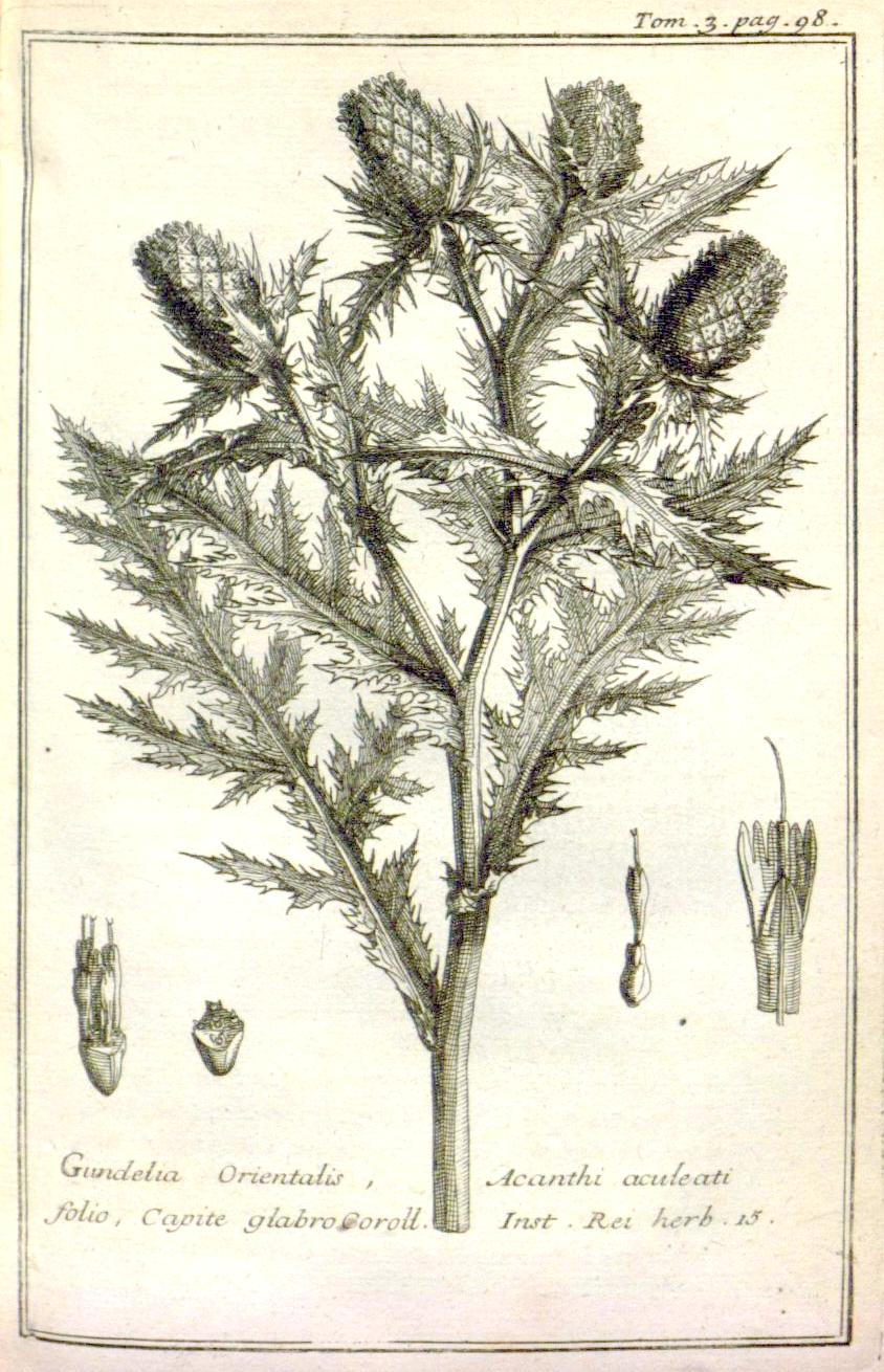 Gundelia tournefortii (Gundelia orientalis)